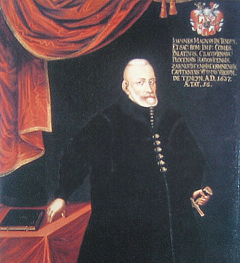 Jan Tęczyński